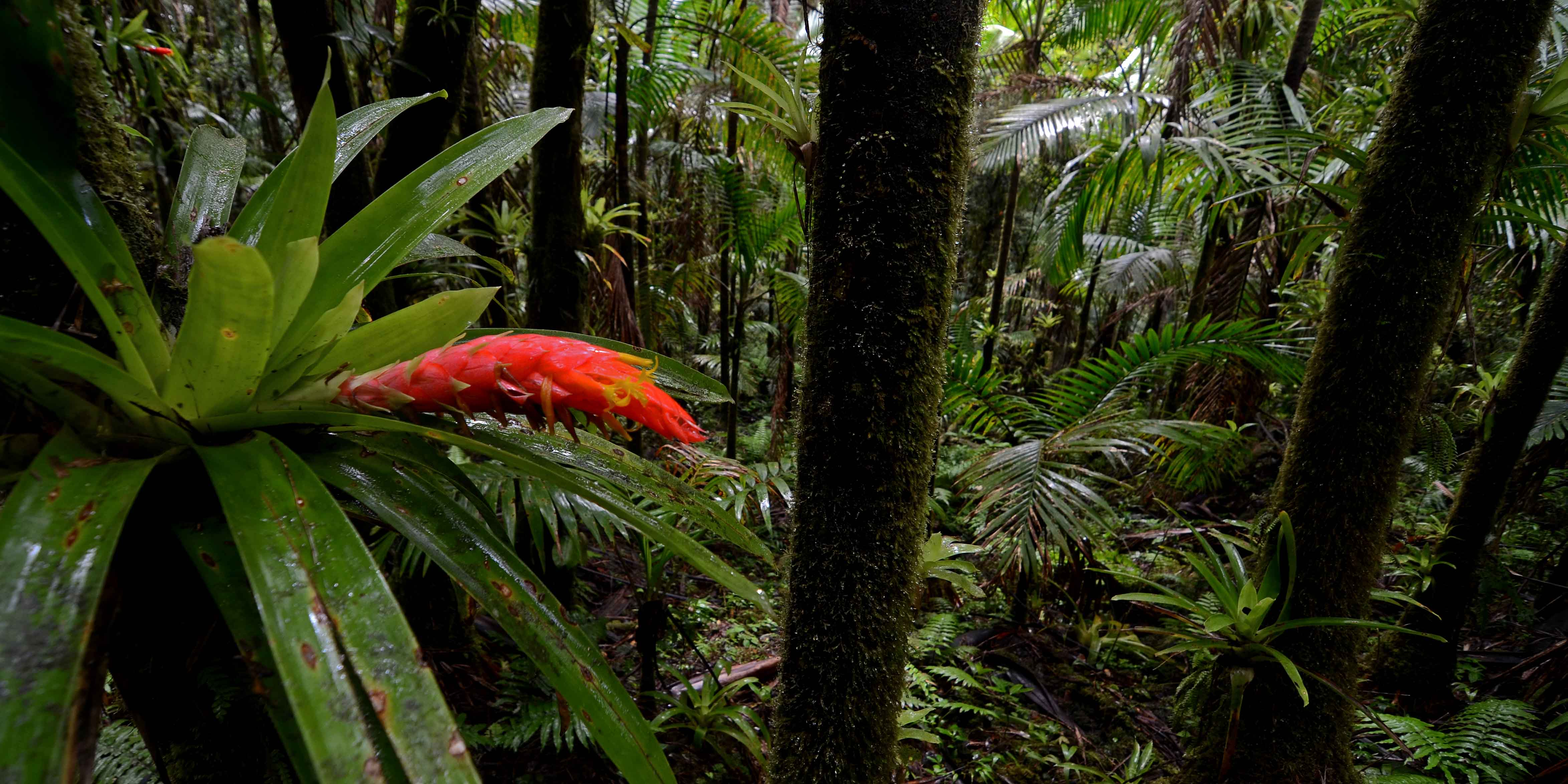 Sierra palm stand, near El Toro Peak El Yunque National Forest, Puerto Rico